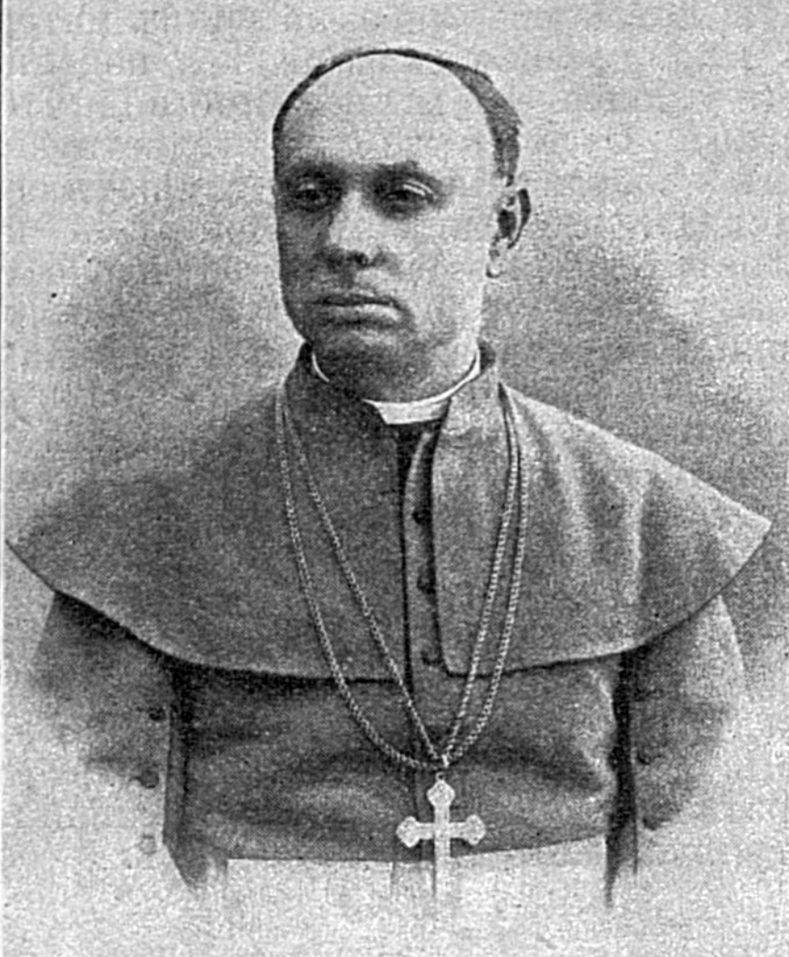 Болеслав Иероним Клопотовский